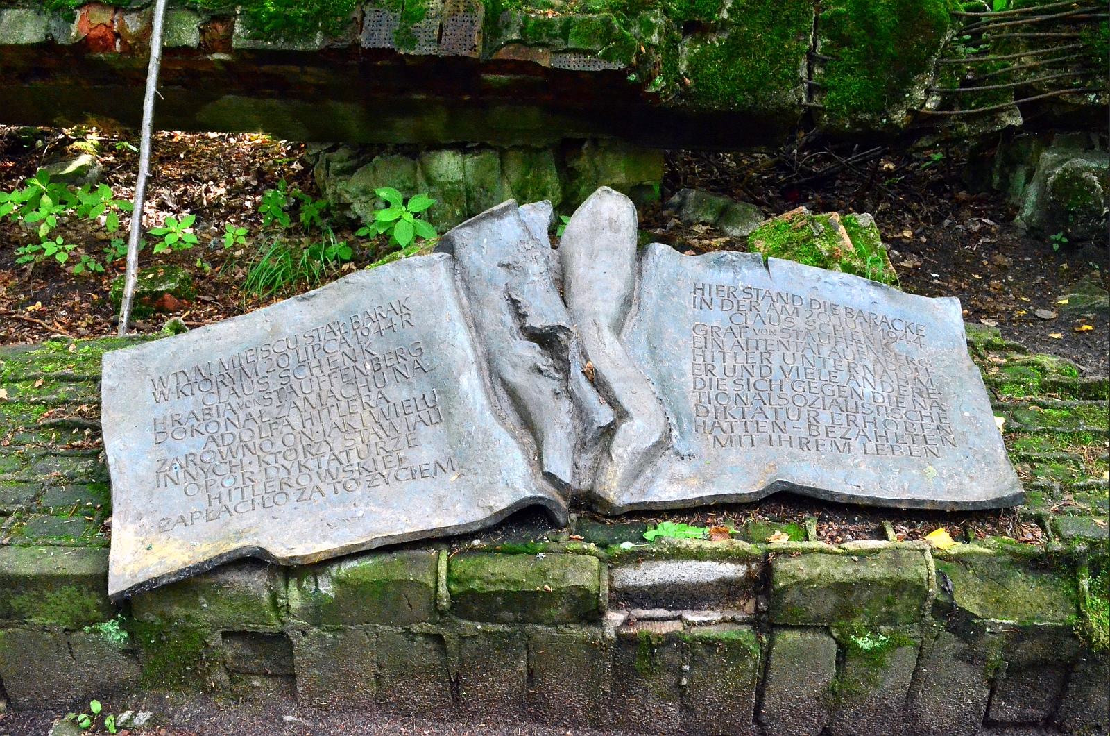 Wolfsschanze: Gedenktafel für das von Claus Schenk Graf von Stauffenberg unternommene Attentat vom 20. Juli 1944.